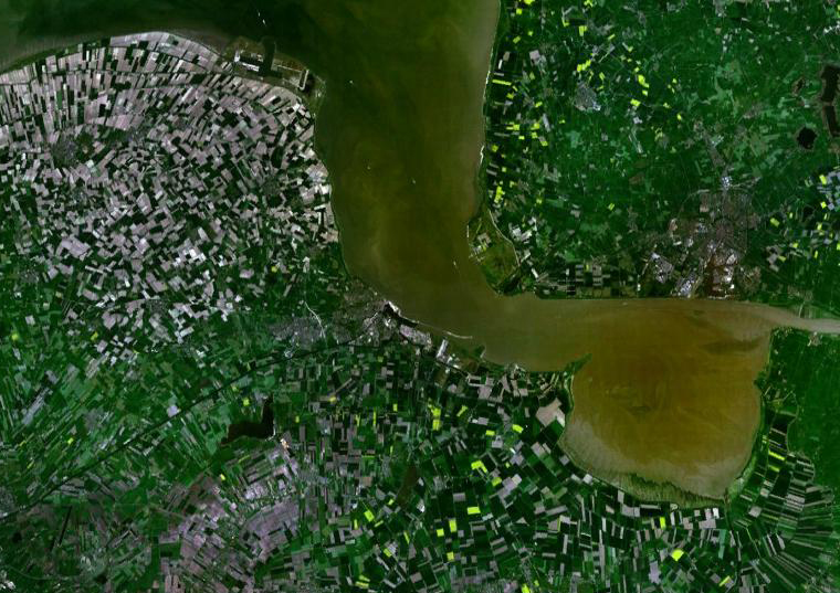 Uitsnede van NASA satellietfoto. Oorspronkelijke afbeelding